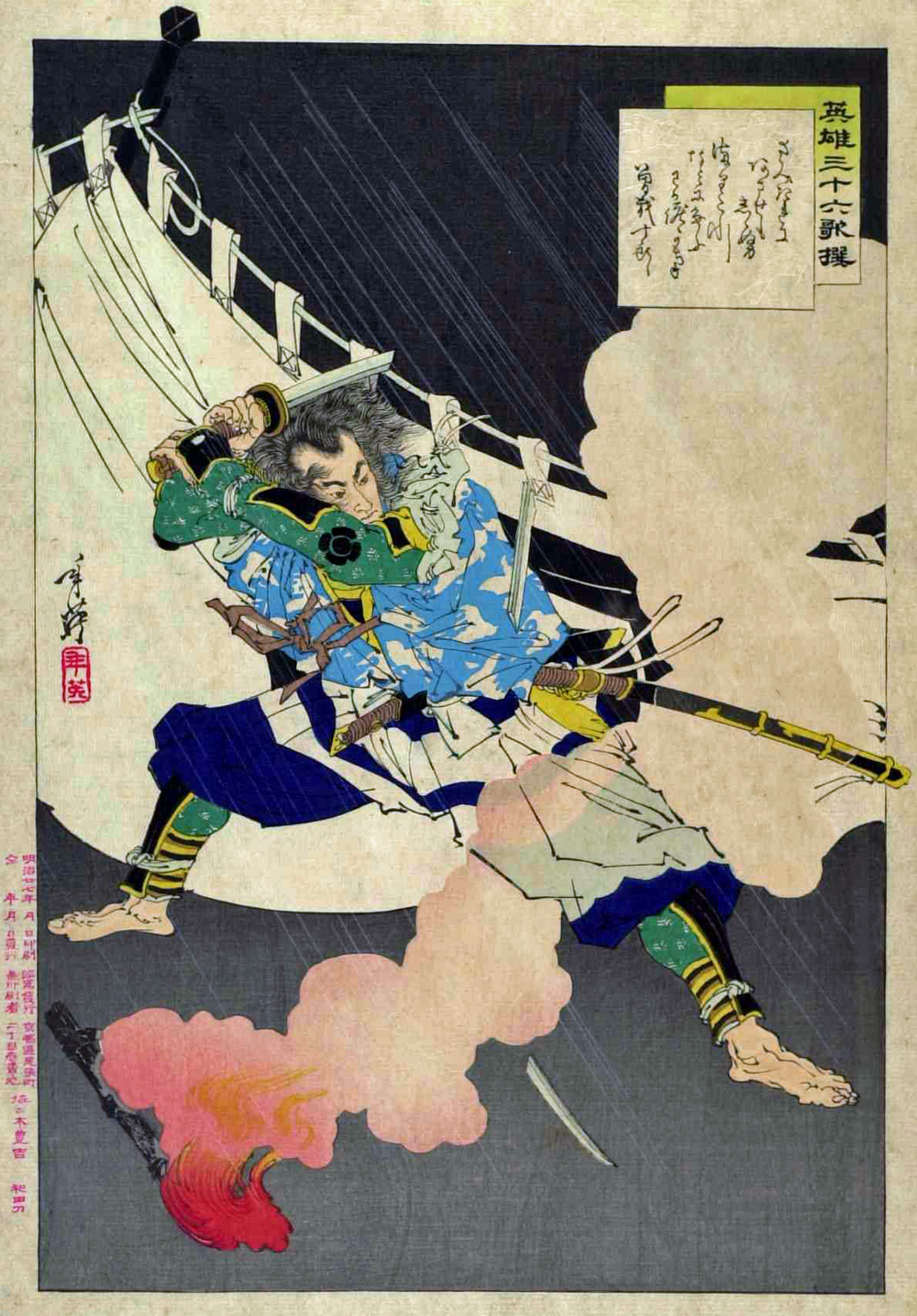 「英雄三十六歌撰：曽我十郎」、大判錦絵